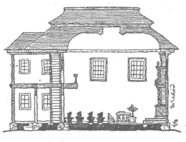 Вид луцкой кенасса в разрезе